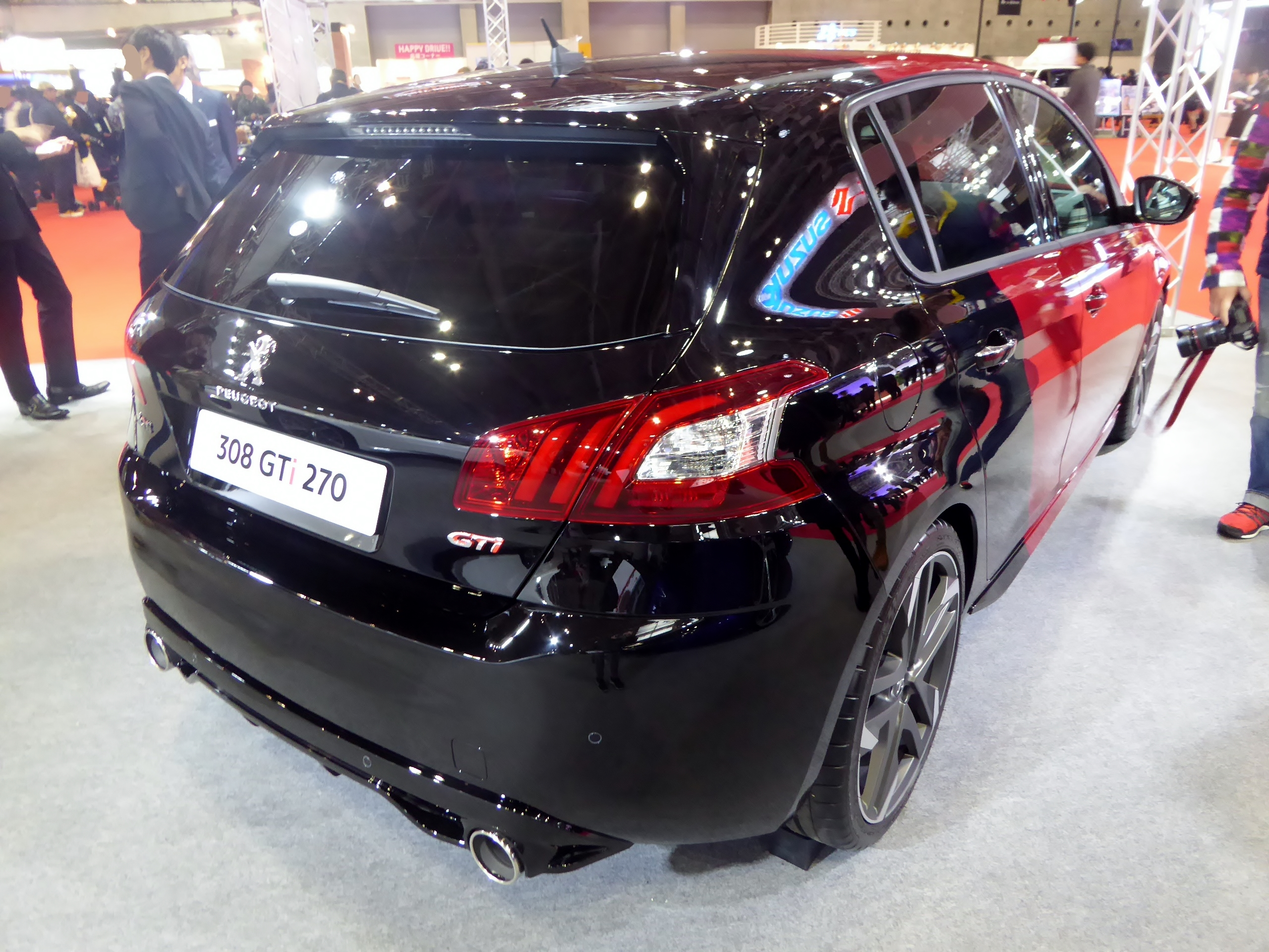 大阪モーターショー2015においてABA-T9HN02型プジョー・308GTi 270を撮影。